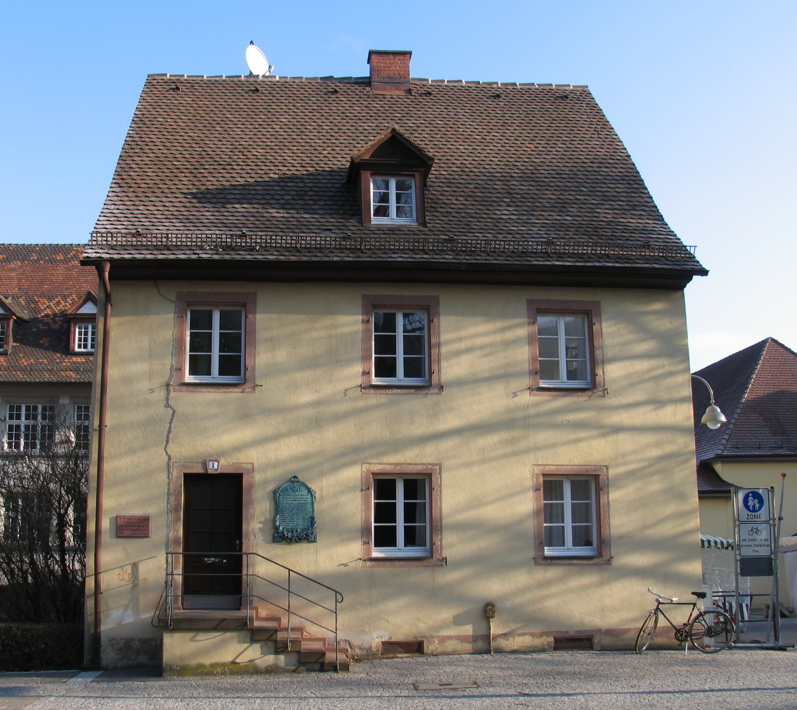 * Beschreibung: ehemaliges Rathaus im Freiburger Stadtteil Littenweiler * Quelle: selbst aufgenommen * Fotograf: CrazyD, 31. Januar 2009 * Description: old cityhall in Littenweiler * Source: photo was taken by my self * Photographer: CrazyD, 31 January 2008